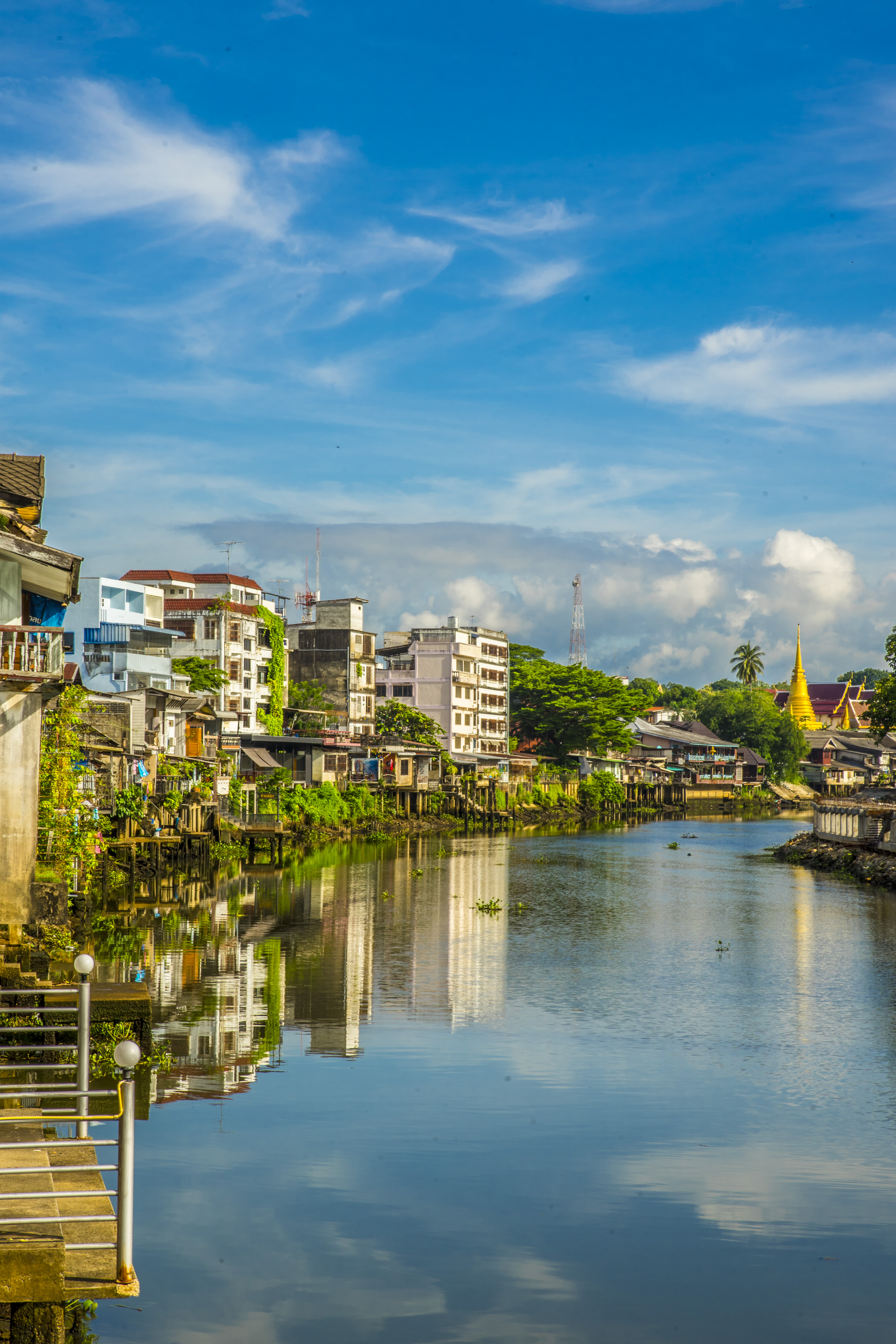 เมืองจันทบุรี (เก่า)